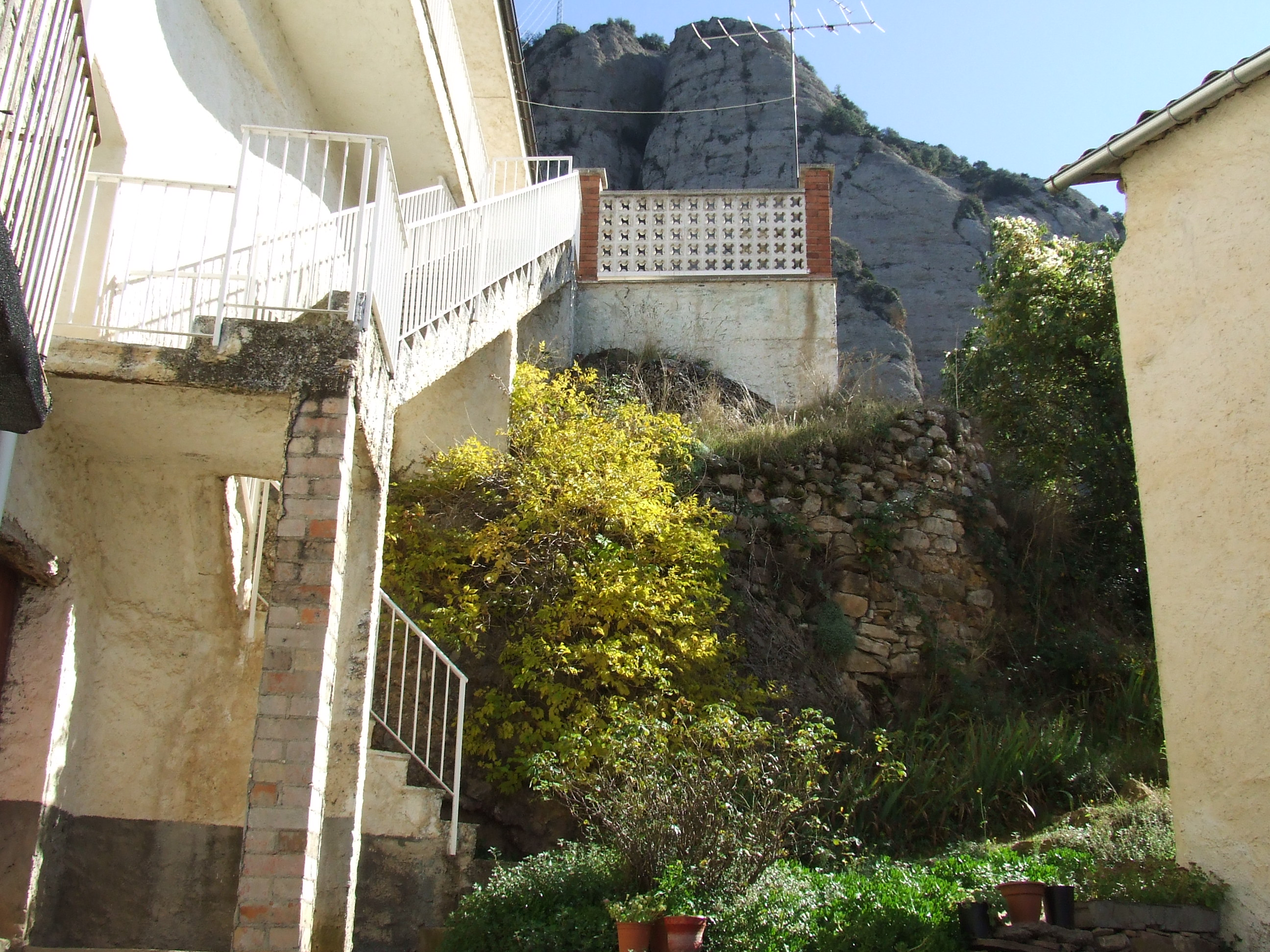 Restes del castell de Benavent de la Conca (Isona i Conca Dellà, Pallars Jussà)